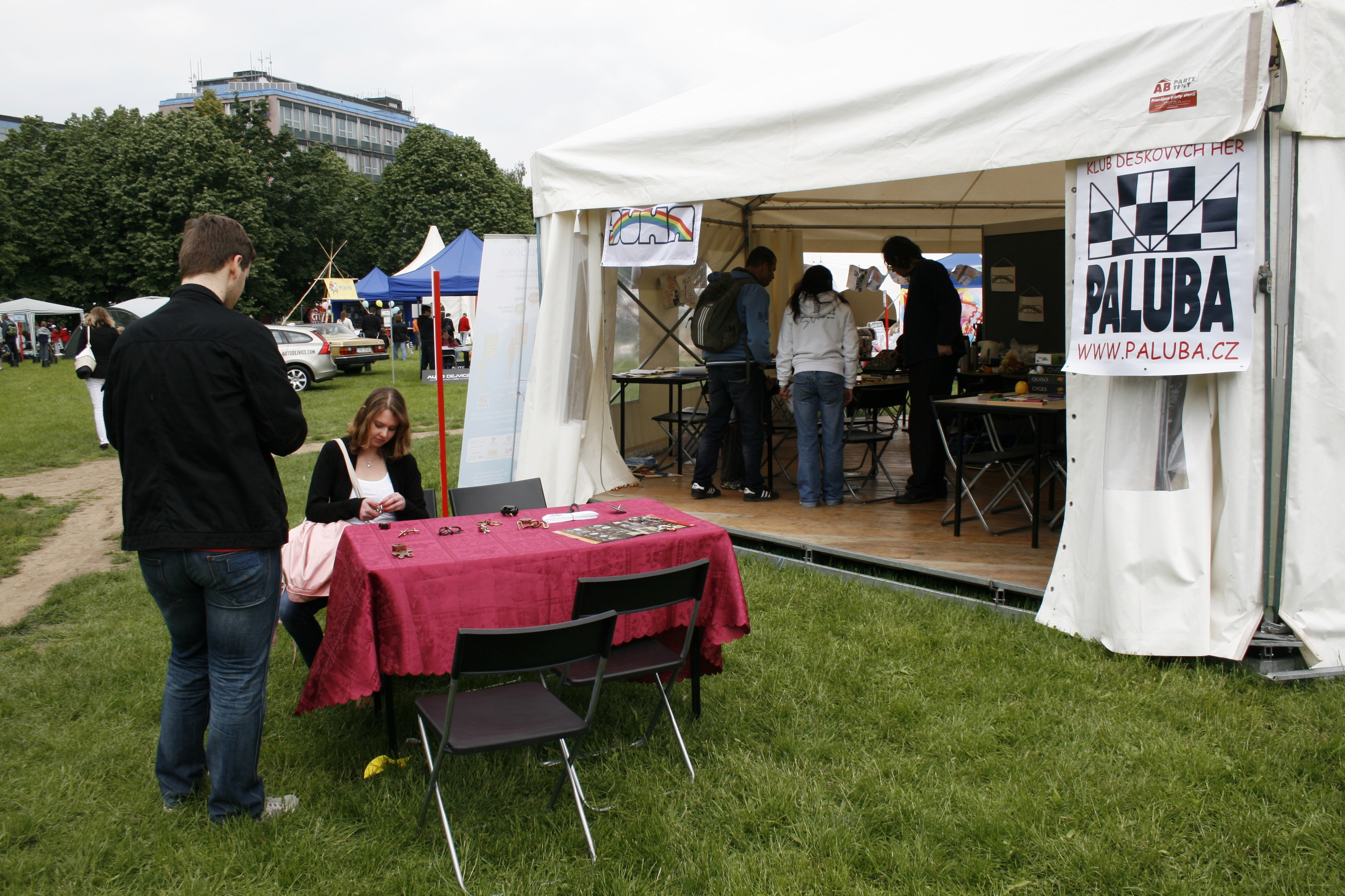 Praha, Vítězné náměstí - Bambiriáda 2013